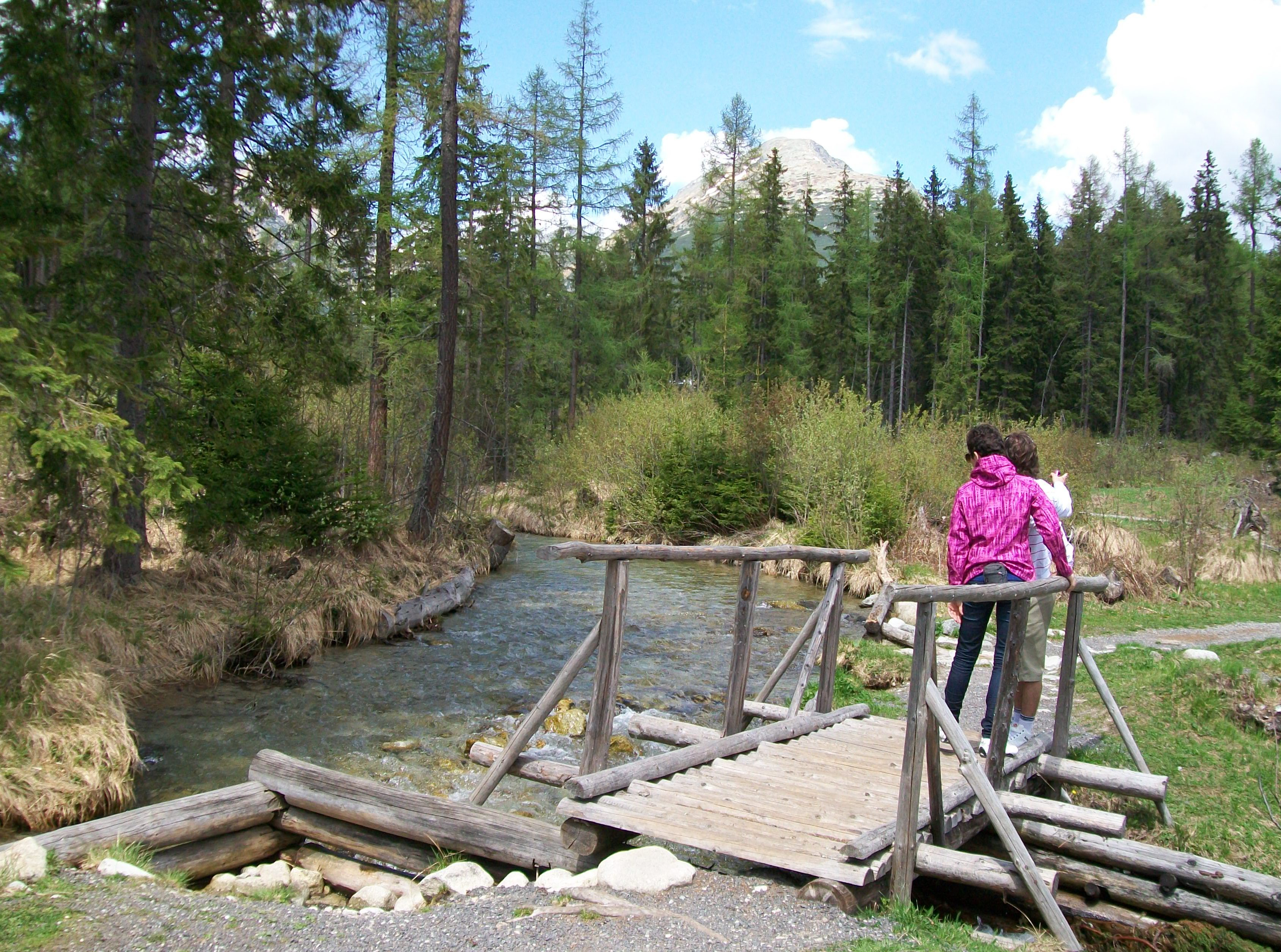 Potok Mlynica tečúci do umelých nádrží (Jazierka lásky)